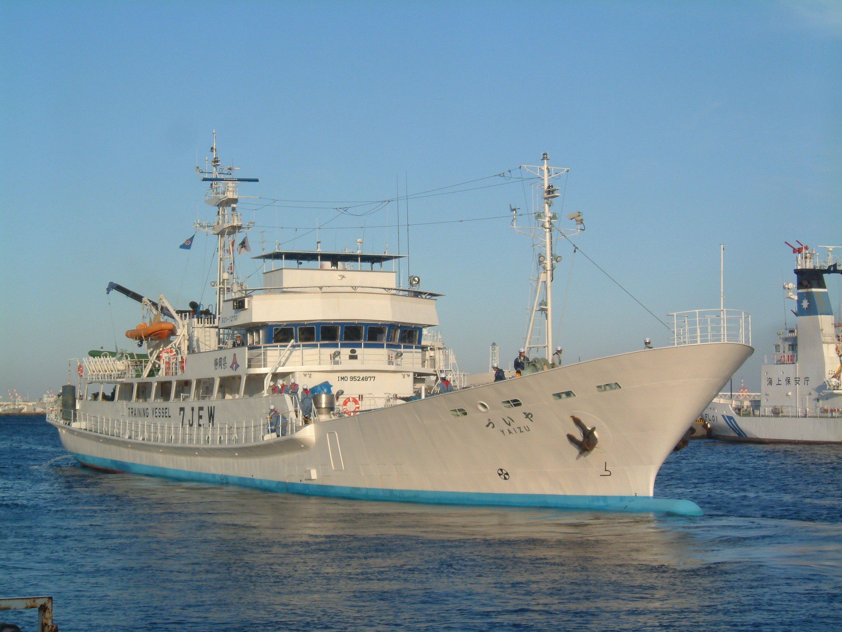 静岡県立焼津水産高等学校の漁業実習船やいづの出港